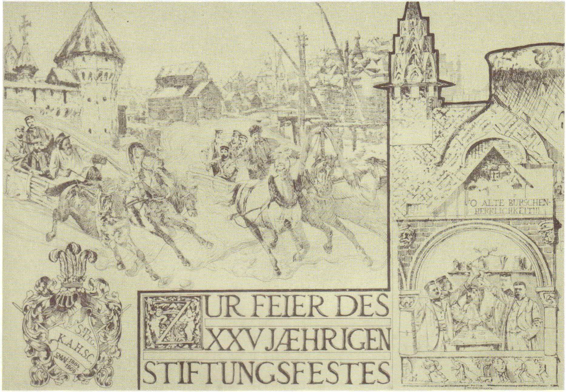 Vorderseite einer Einladungskarte des AHSC zu St. Petersburg zum 25. Stiftungsfest am 7. (20.) März 1909